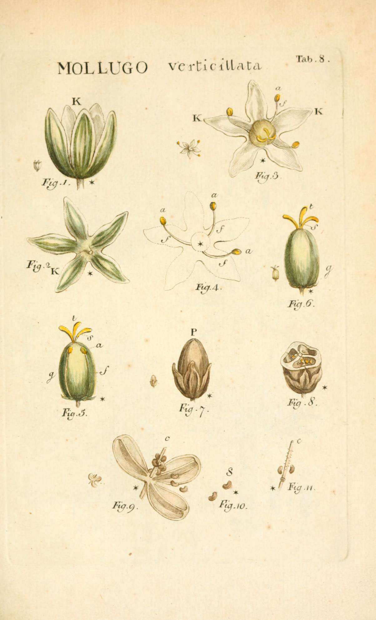 MOLLUGO vcrtrid'Uata Tab. 8 % • I ^ , //- Fur.6 ^J n cu J^ M^.4 Fw.S. Ftci.O\ Fiq .8 C:^ x^ .: ' Ftq.n